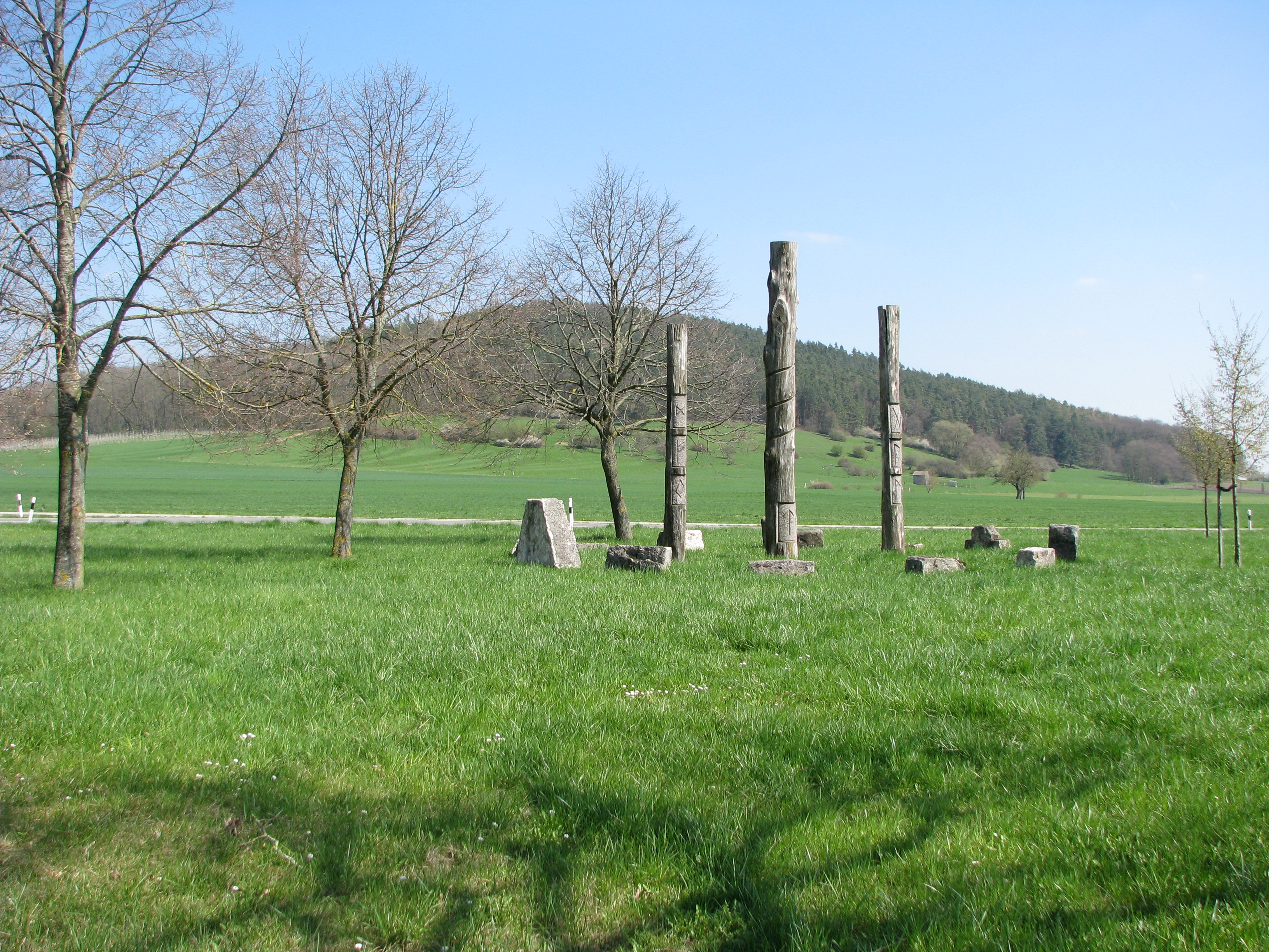 Oberndorf, Ortsteil der Stadt Freystadt im Landkreis Neumarkt in der Oberpfalz, Bayern, Installation "Sonnenkreis"